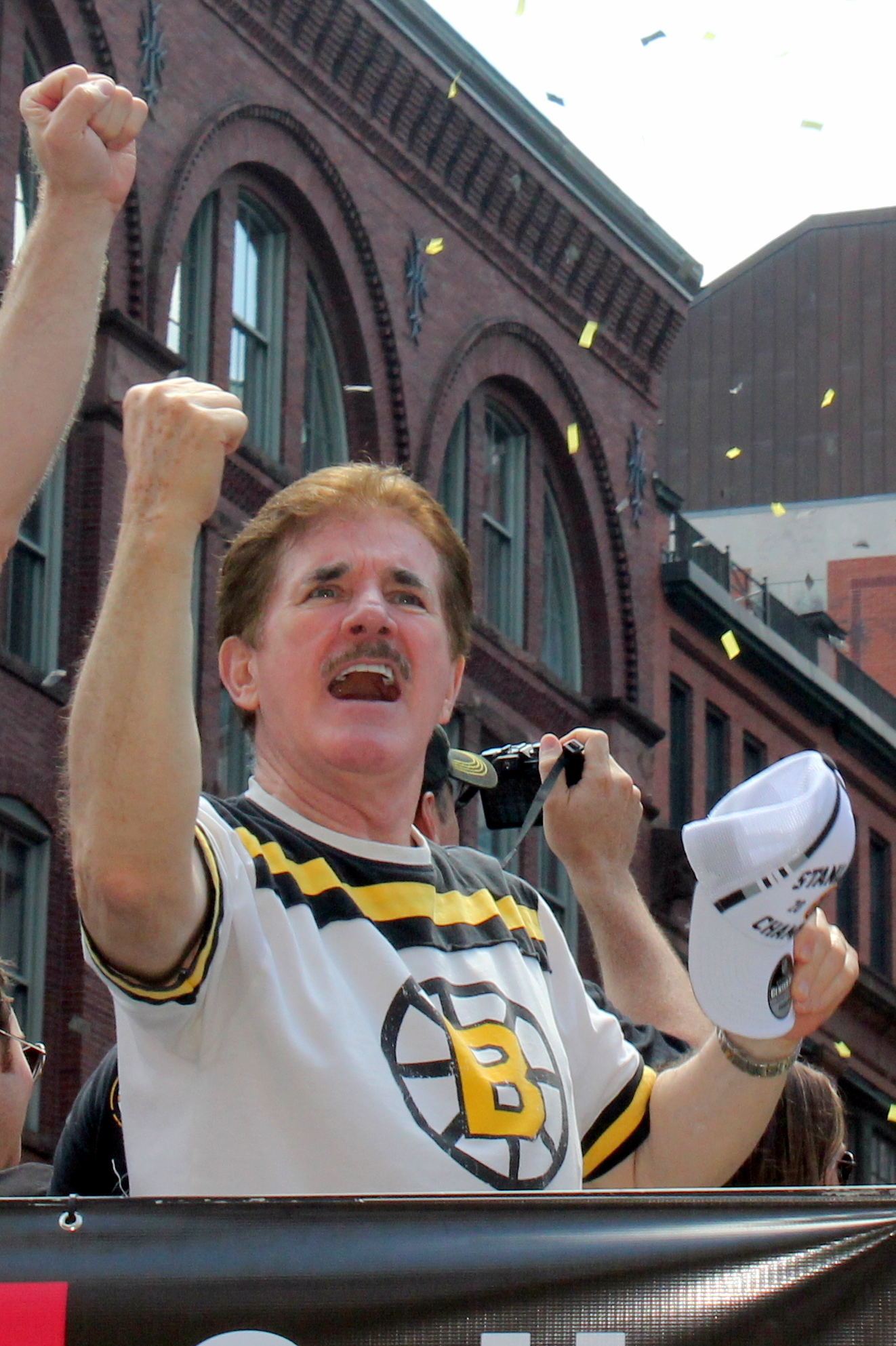 Rene!!!